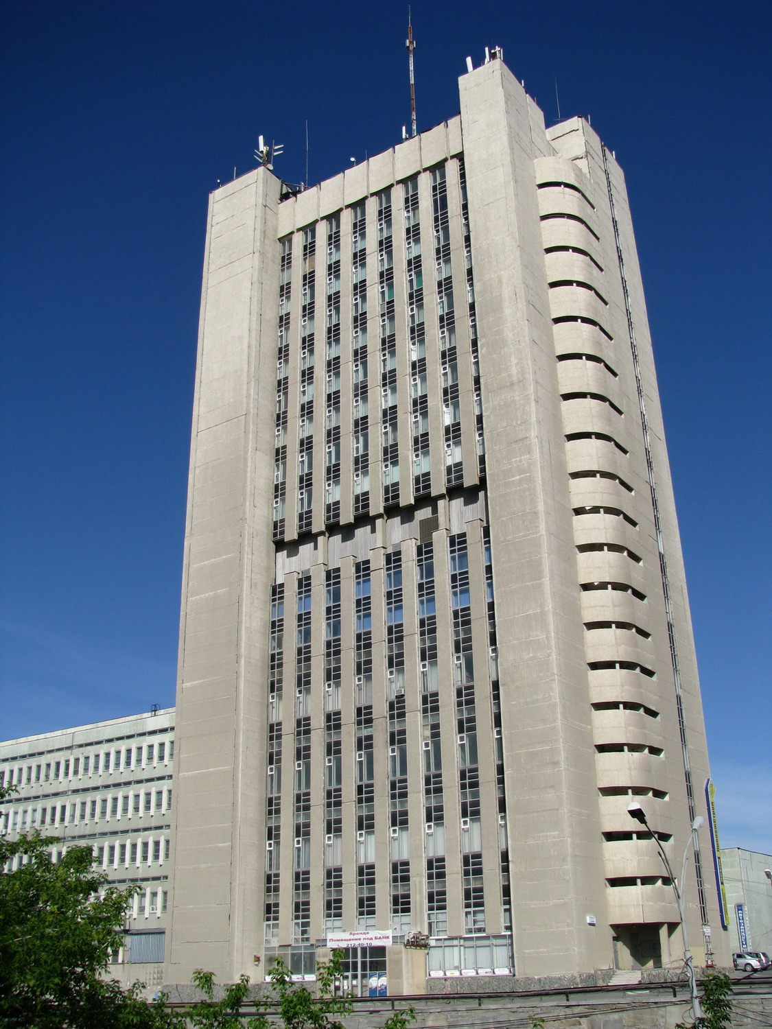 Инженерно-лабораторный корпус НПО Автоматики (Екатеринбург)